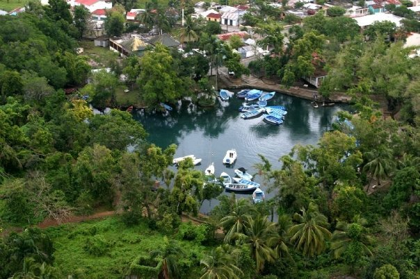 Vista aérea de la Laguna Gri-Gri